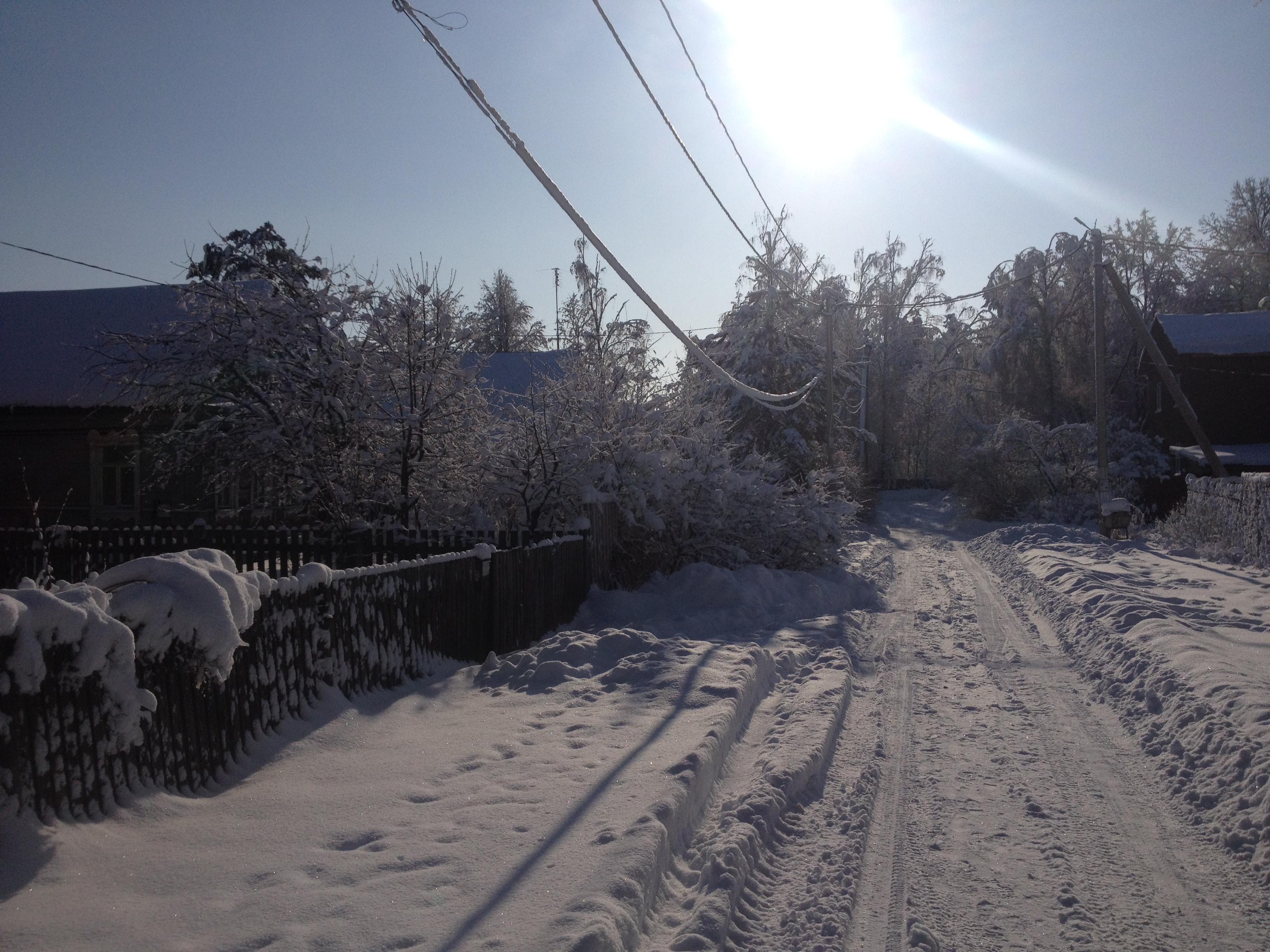 Частный сектор в посёлке Пески, Коломенский район, Московская область.